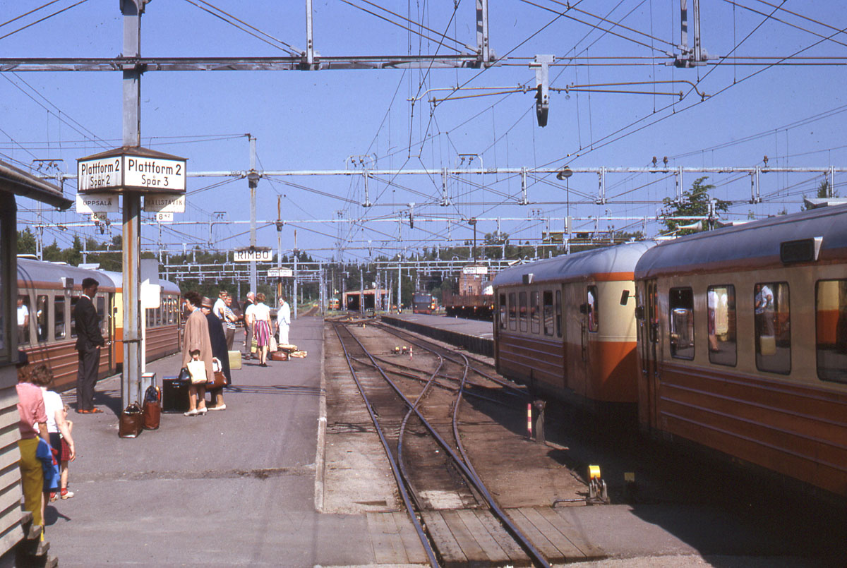 Rimbo station med två rälsbusståg på spår 2 och 4 i juni 1966. Ännu fortgår trafiken mot Uppsala och Hallstavik, ett halvår senare, i januari 1967, var persontrafiken nedlagd på båda dessa linjer. Tåget på spår 2 är på väg mot Uppsala Ö och det på spår 4 mot Stockholm Ö.